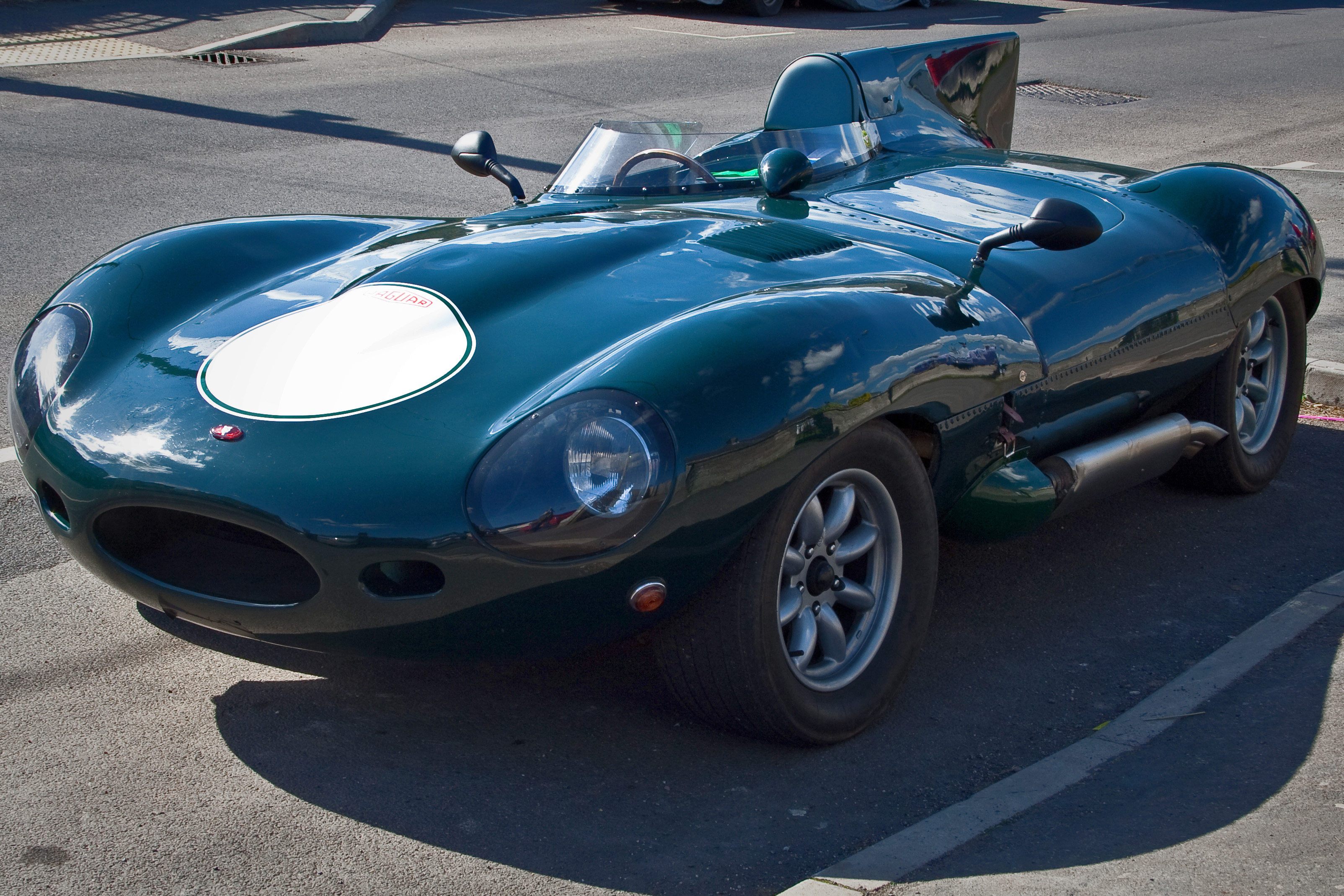 Jaguar D-Type Reproduction